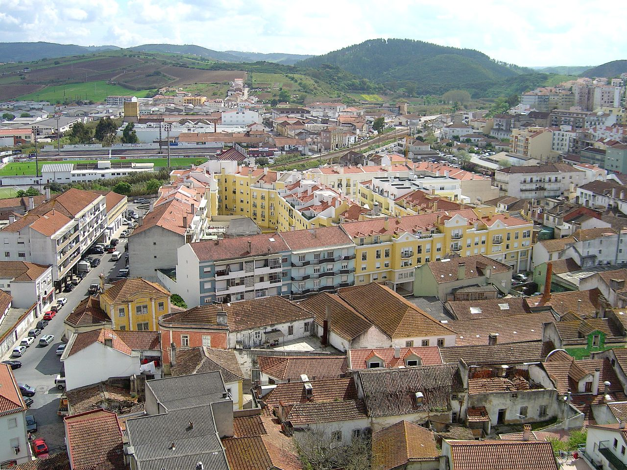 Torres Vedras (Portugal)